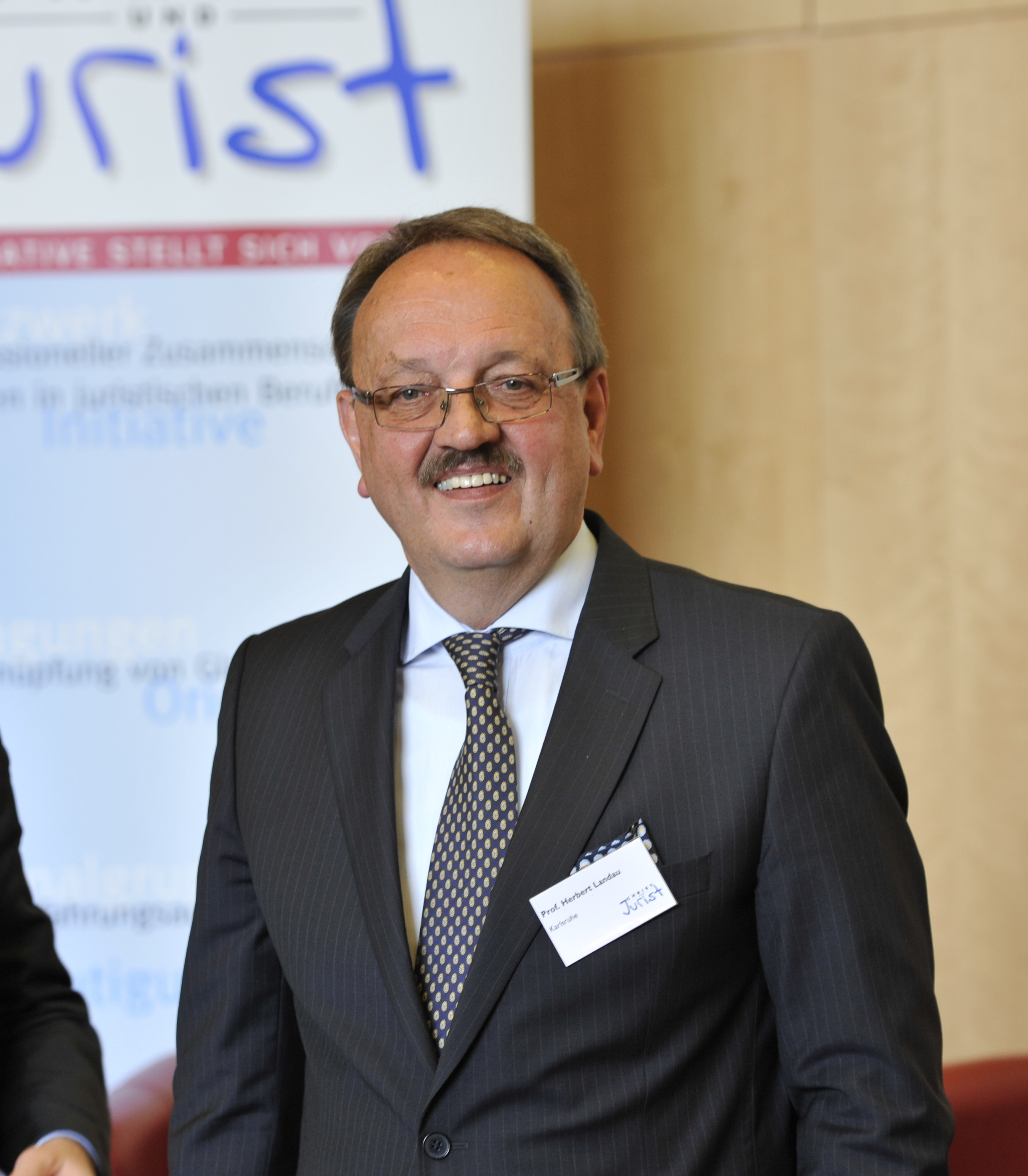 Herbert Landau, Richter des Bundesverfassungsgerichts, bei der Tagung "Christ und Jurist" am 5. Mai 2012 in Frankfurt am Main